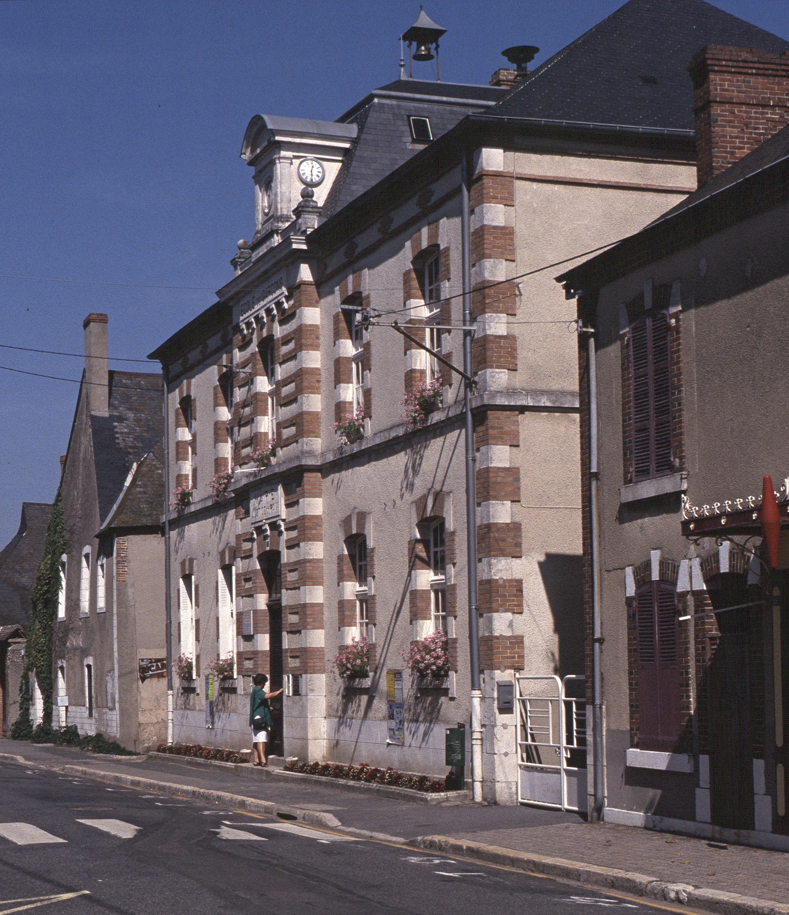 La Chapelle-d'Angillon / Mairie & École